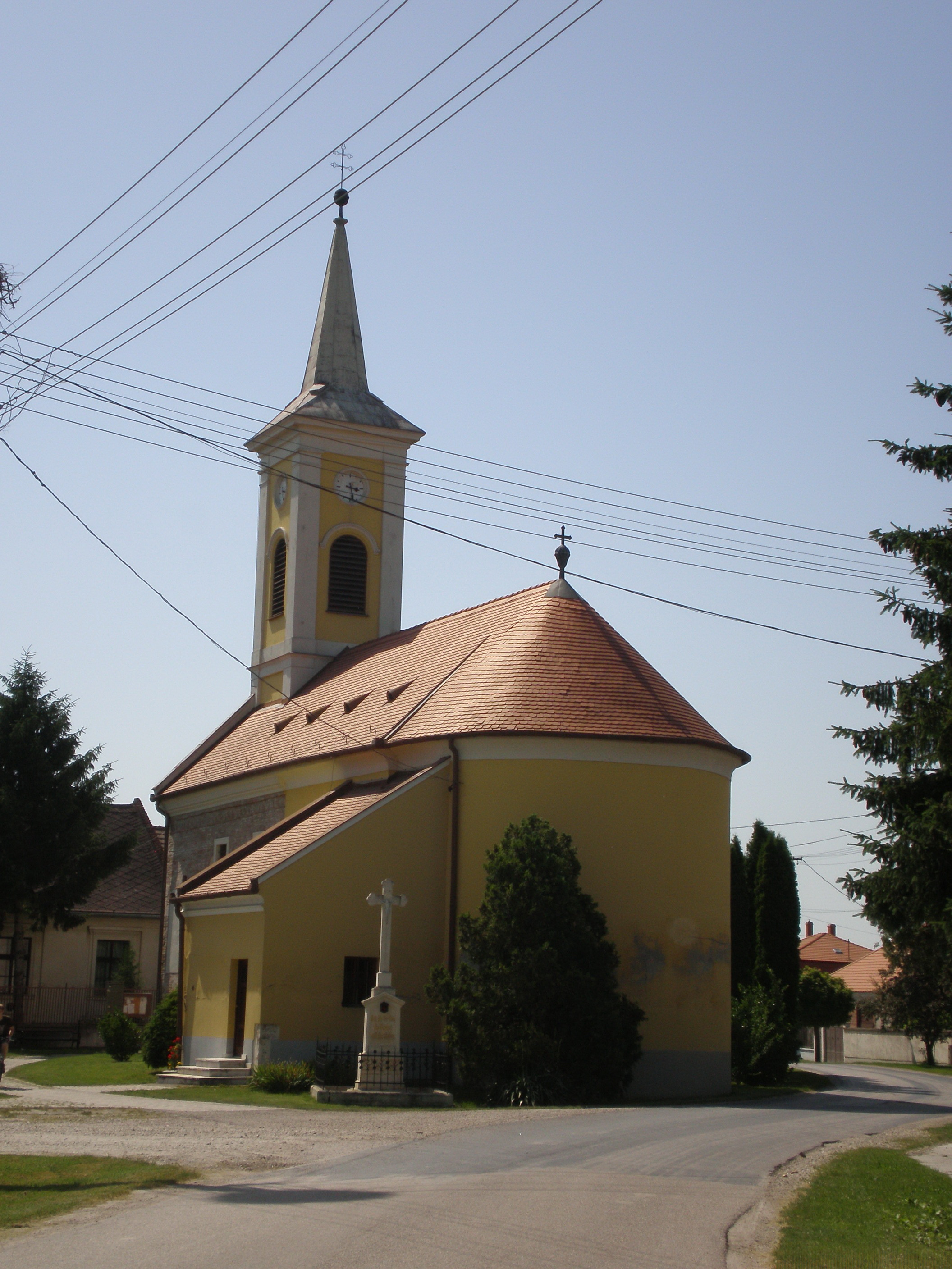 Magyarkimle, Sarlós Boldogasszony-templom